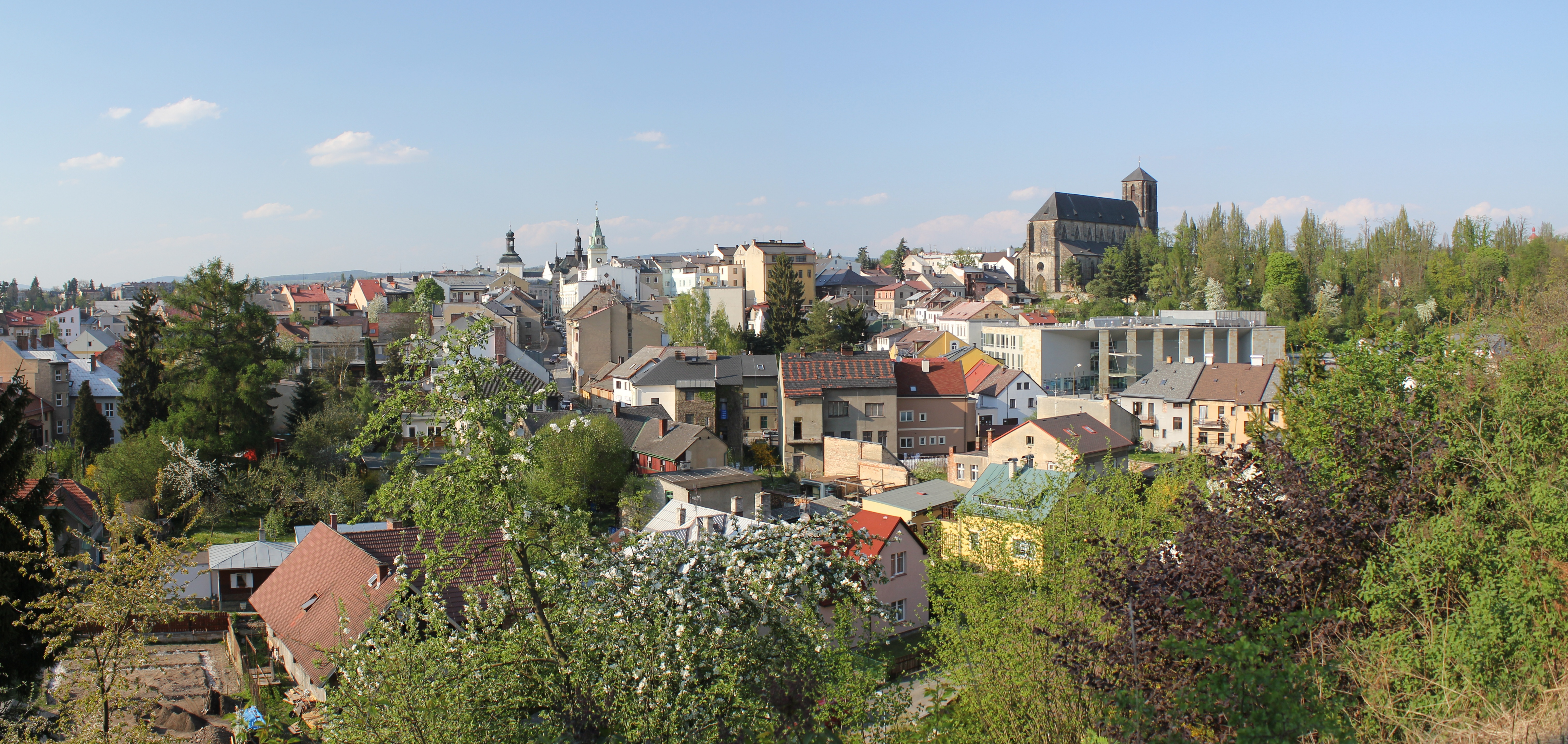 Panorama východní části Turnova z ul. Antonína Dvořáka